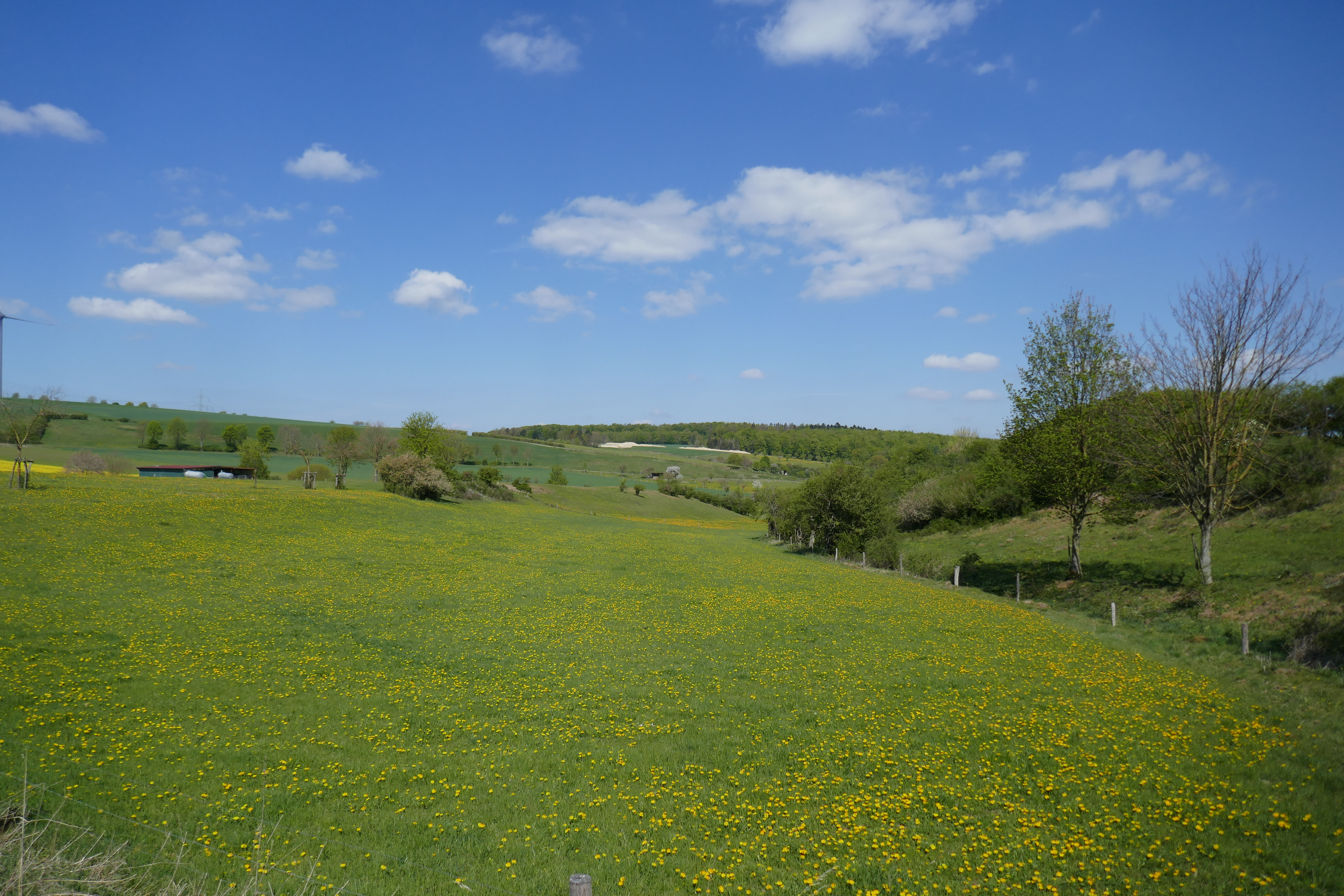 Reingraben nördlich der Wüstung Versloh (geschützter Landschaftsbestandteil, LP Lichtenau, Nr. 2.4.32); Landschaftsschutzgebiet „Fließgewässer und Trockentäler“